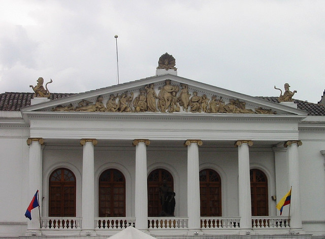 Detalle del frontispicio y el balcón del teatro Nacional Sucre, en el centro histórico de la ciudad, Quito.